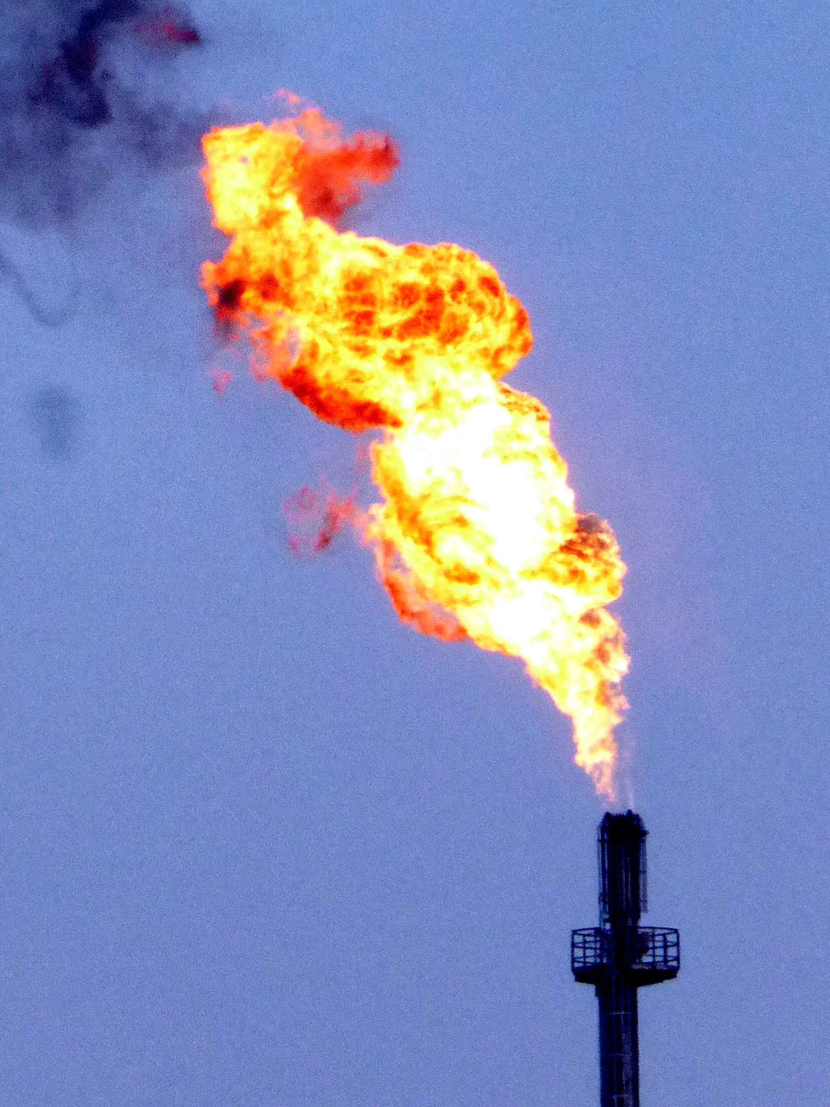 Abfackeln von Gas in der Raffinerie Gunvor in Ingolstadt.